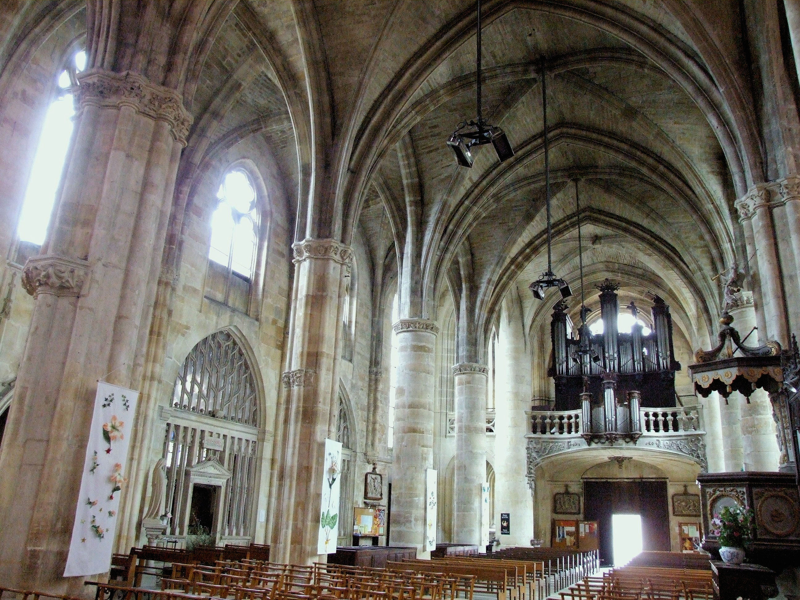 Bar-le-Duc - Eglise Saint-Etienne - Nef